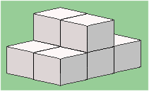 Egen teckning